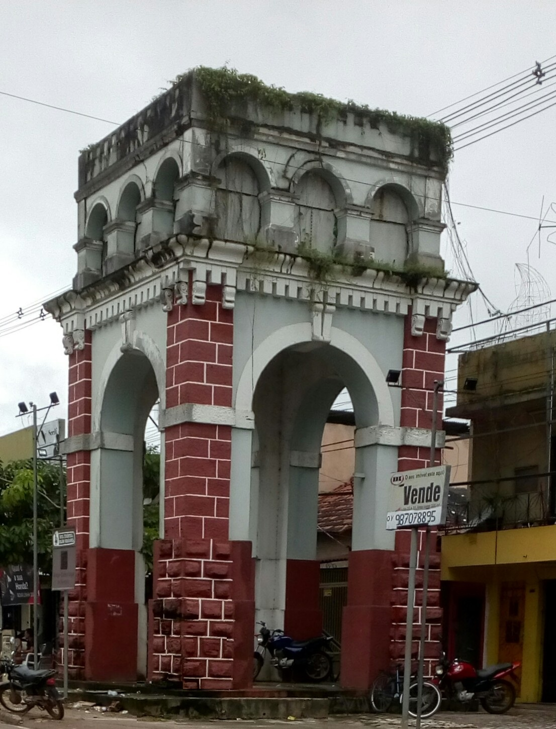 Antiga caixa d'água da vila operária de Marituba